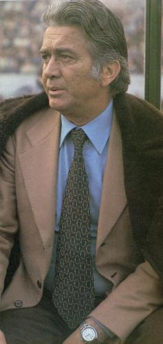 L'allenatore di calcio italiano Tommaso Maestrelli negli anni 70 del XX secolo.